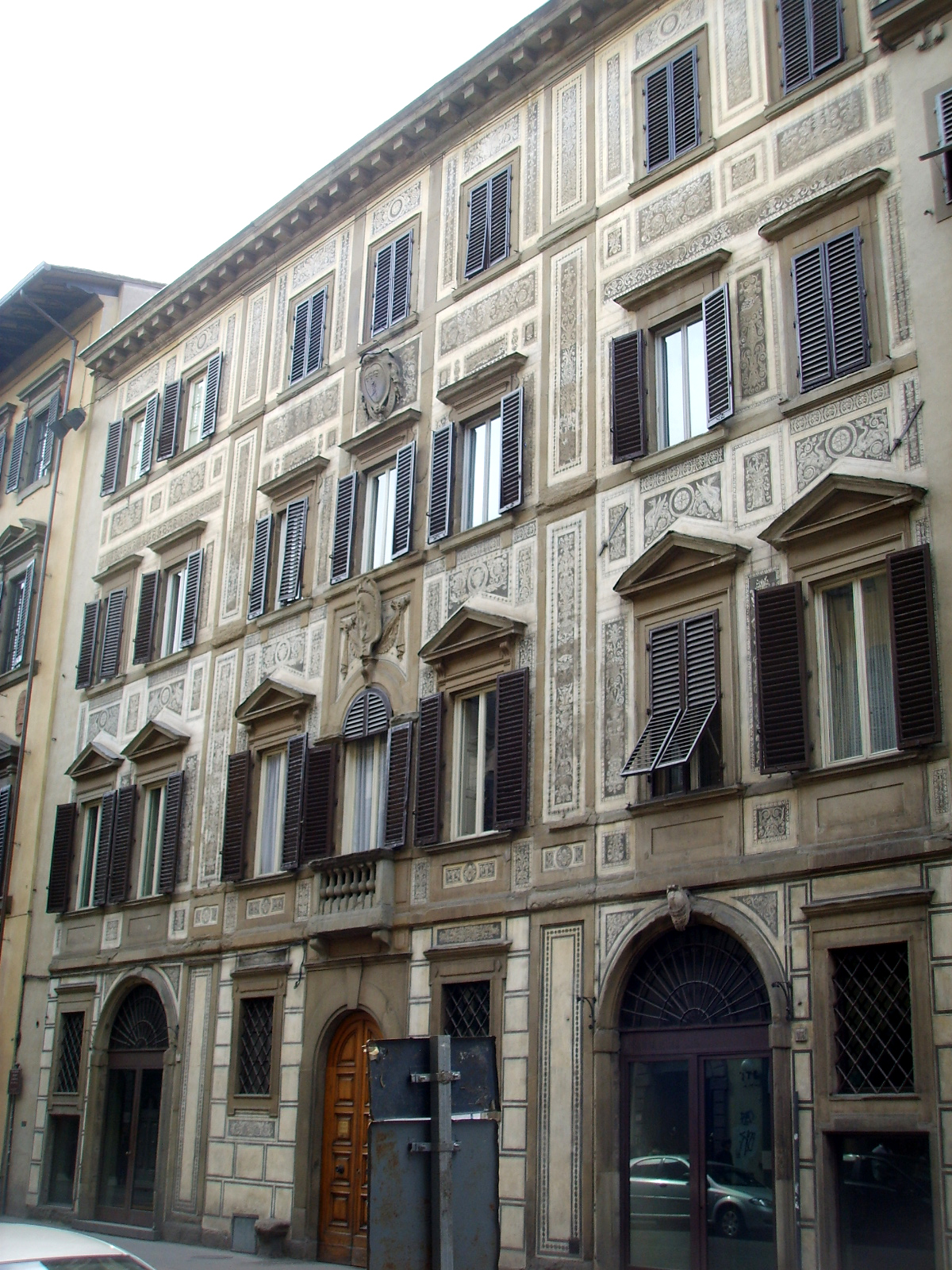 Palazzo Fenzi in florence